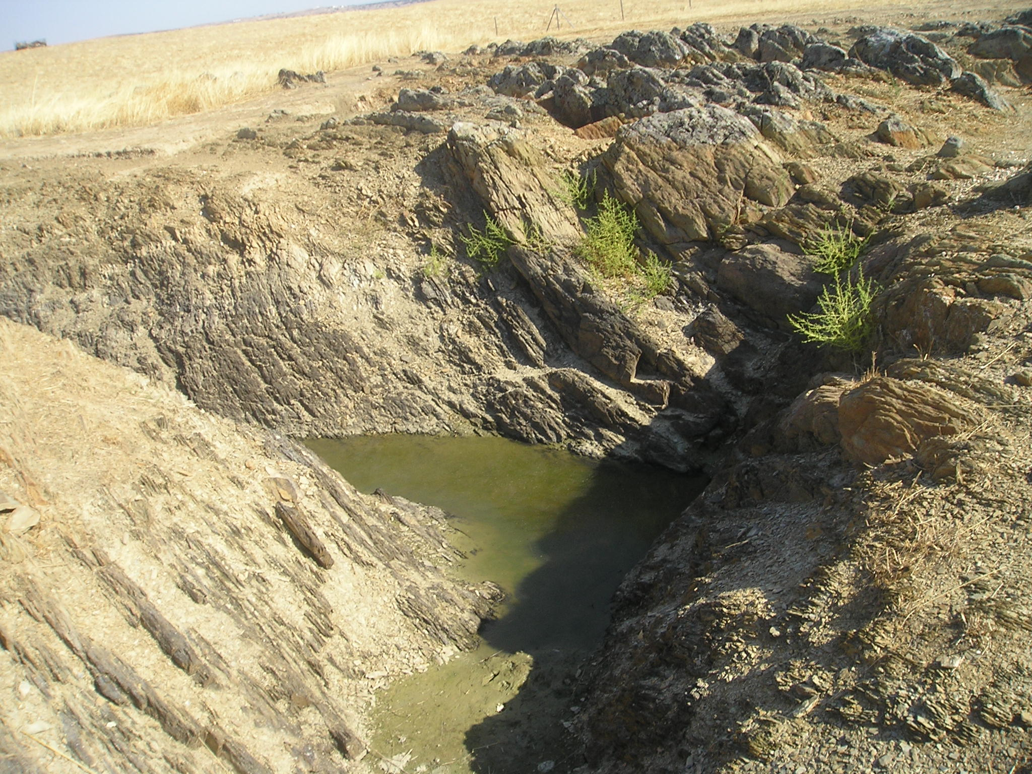 Foso, tallado en el suelo de pizarra, del campamento romano de Castra Caecilia (Cáceres, España).